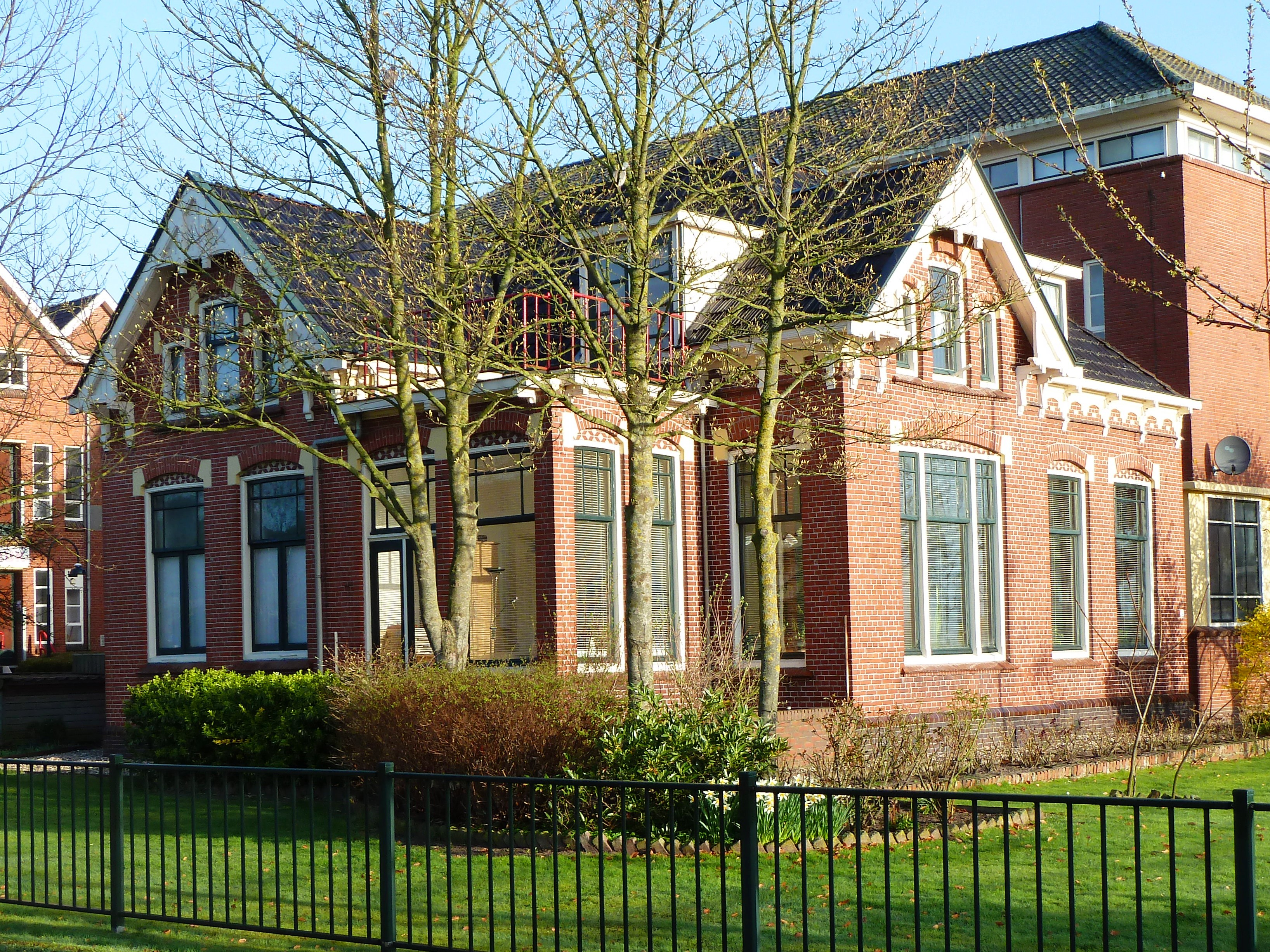 Directeurswoning van de voormalige zuivelfabriek de Kievit aan de Kievitsweg 22 in Grijpskerk (Zuidhorn, Groningen, Nederland). Ontworpen in 1909 in overgangsarchitectuur door Klaas Siekman.